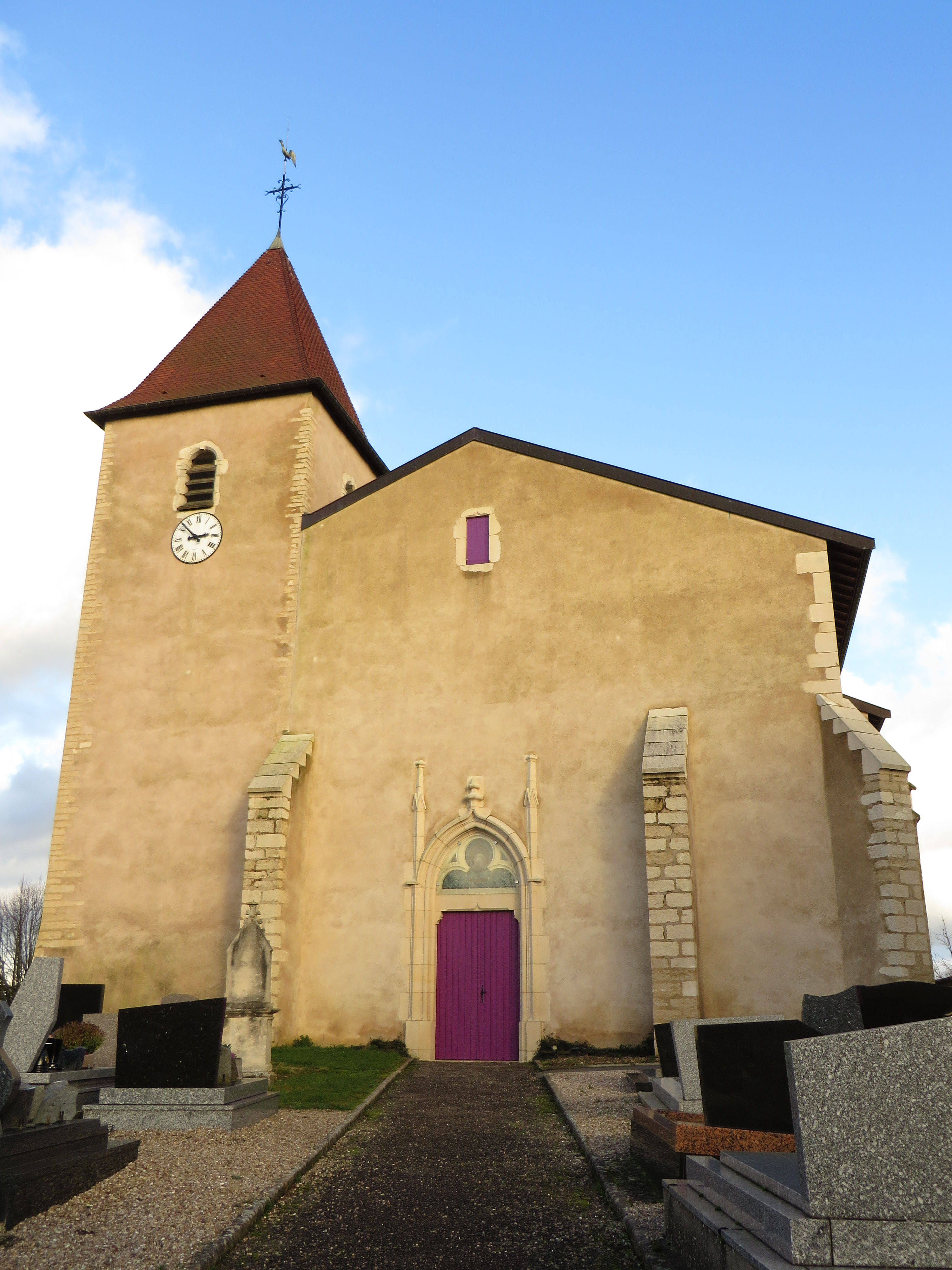 Francheville eglise